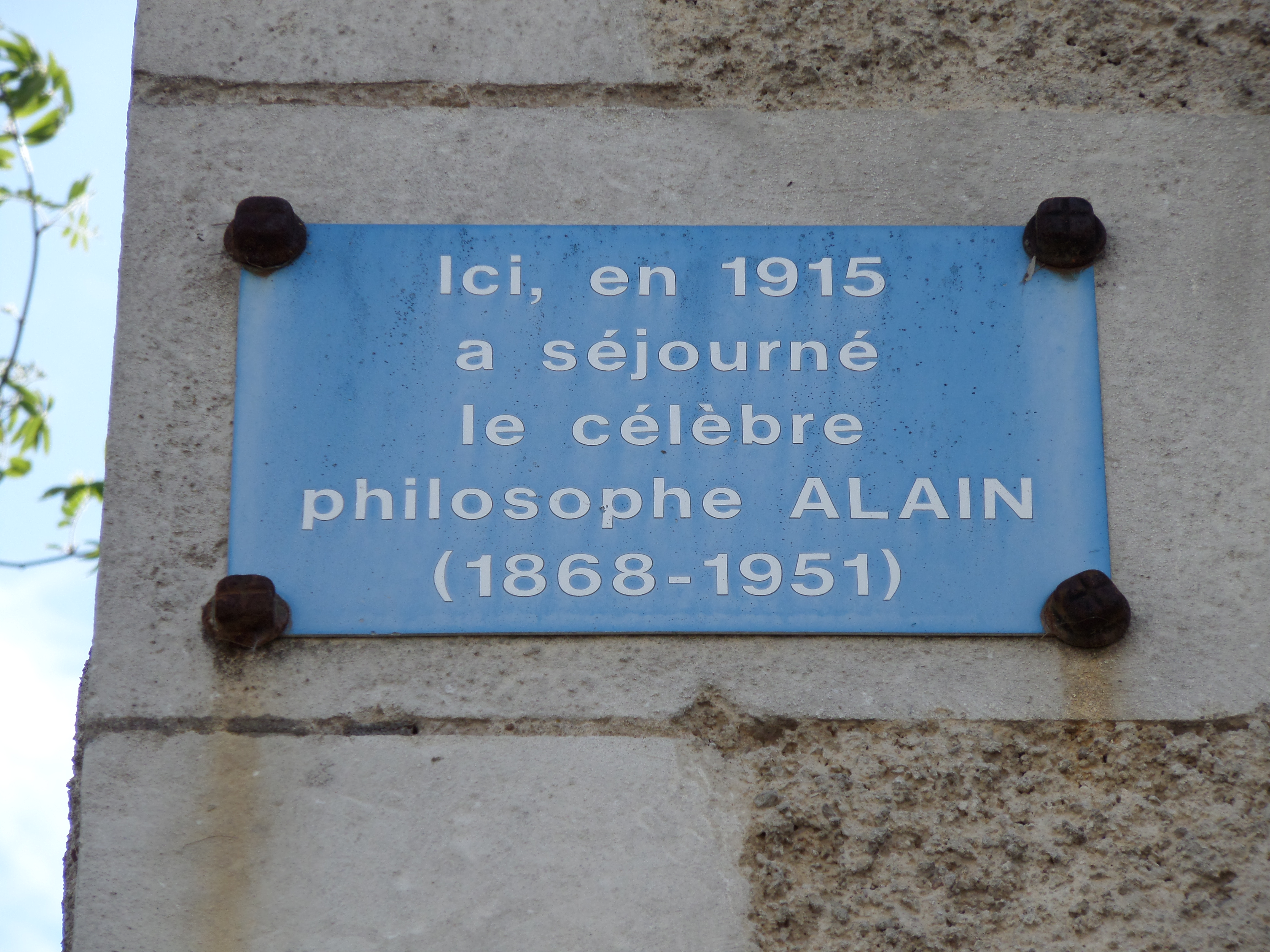 Séjour du philosophe alain sur la commune de Trondes en 1915